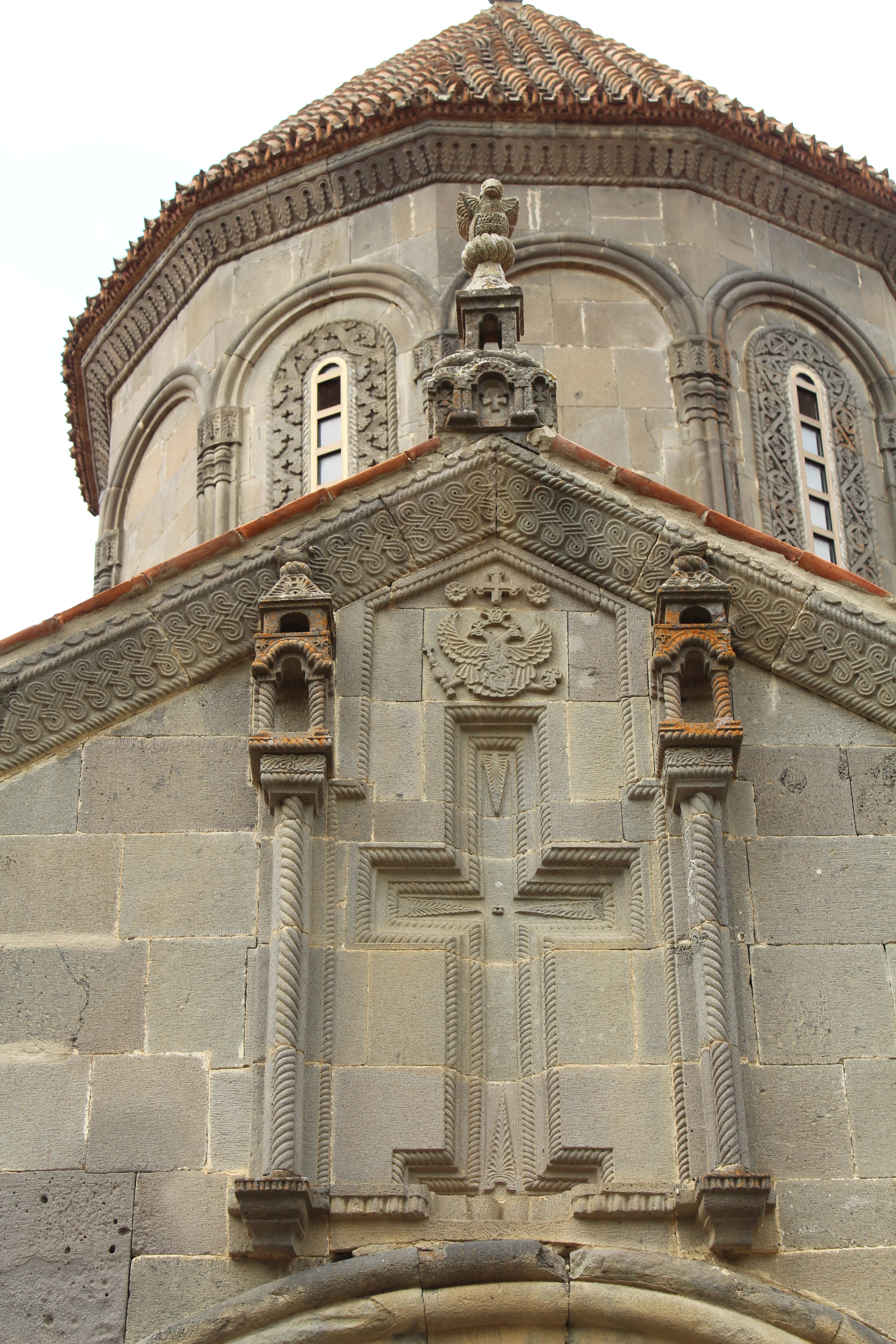 გუმბათიანი ეკლესიაგალავანი და სამრეკლო